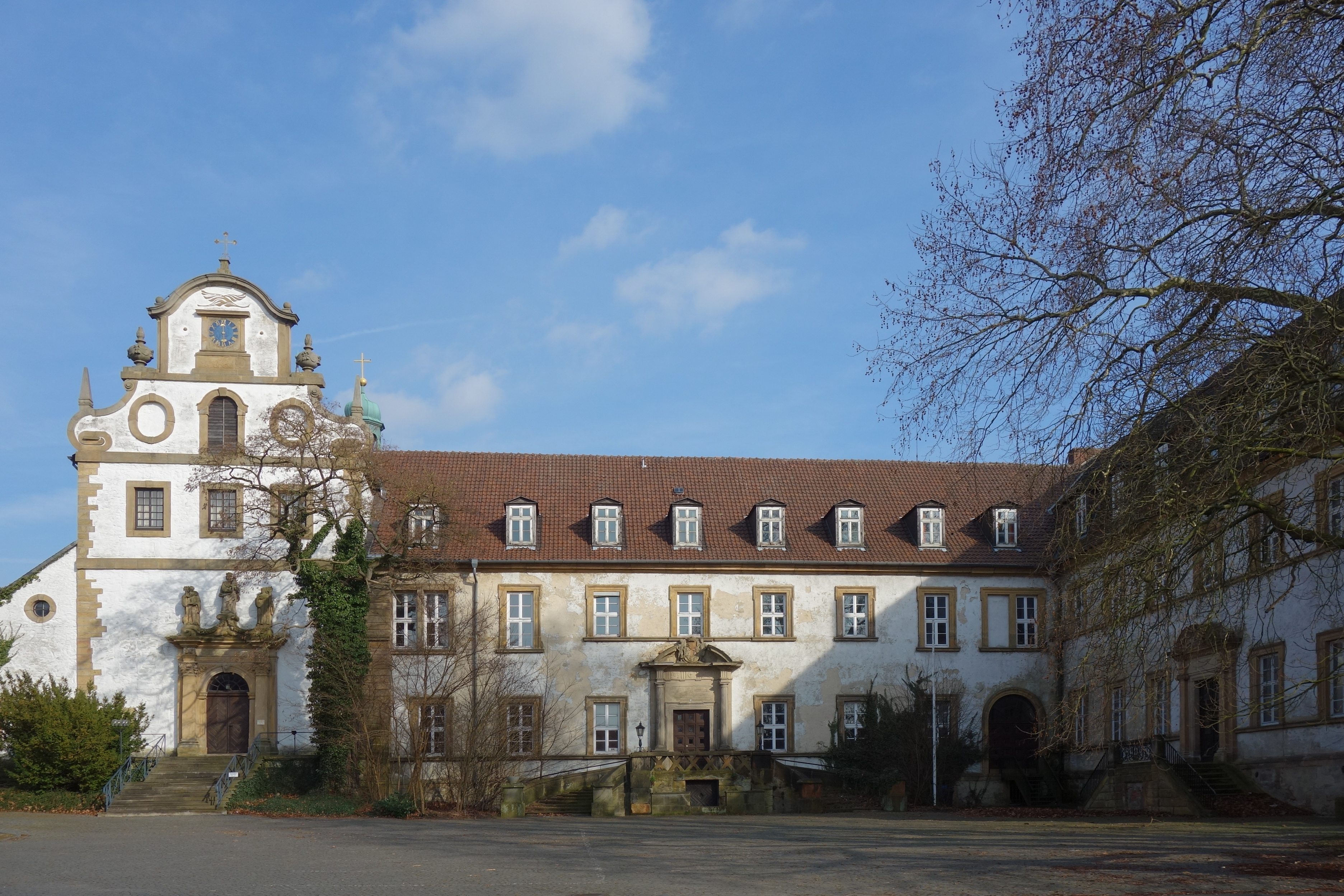 Salzgitter-Ringelheim, Klosterhof des ehemaligen Klosters Ringelheim, links das Eingangsportal der Kirche St. Abdon und Sennen